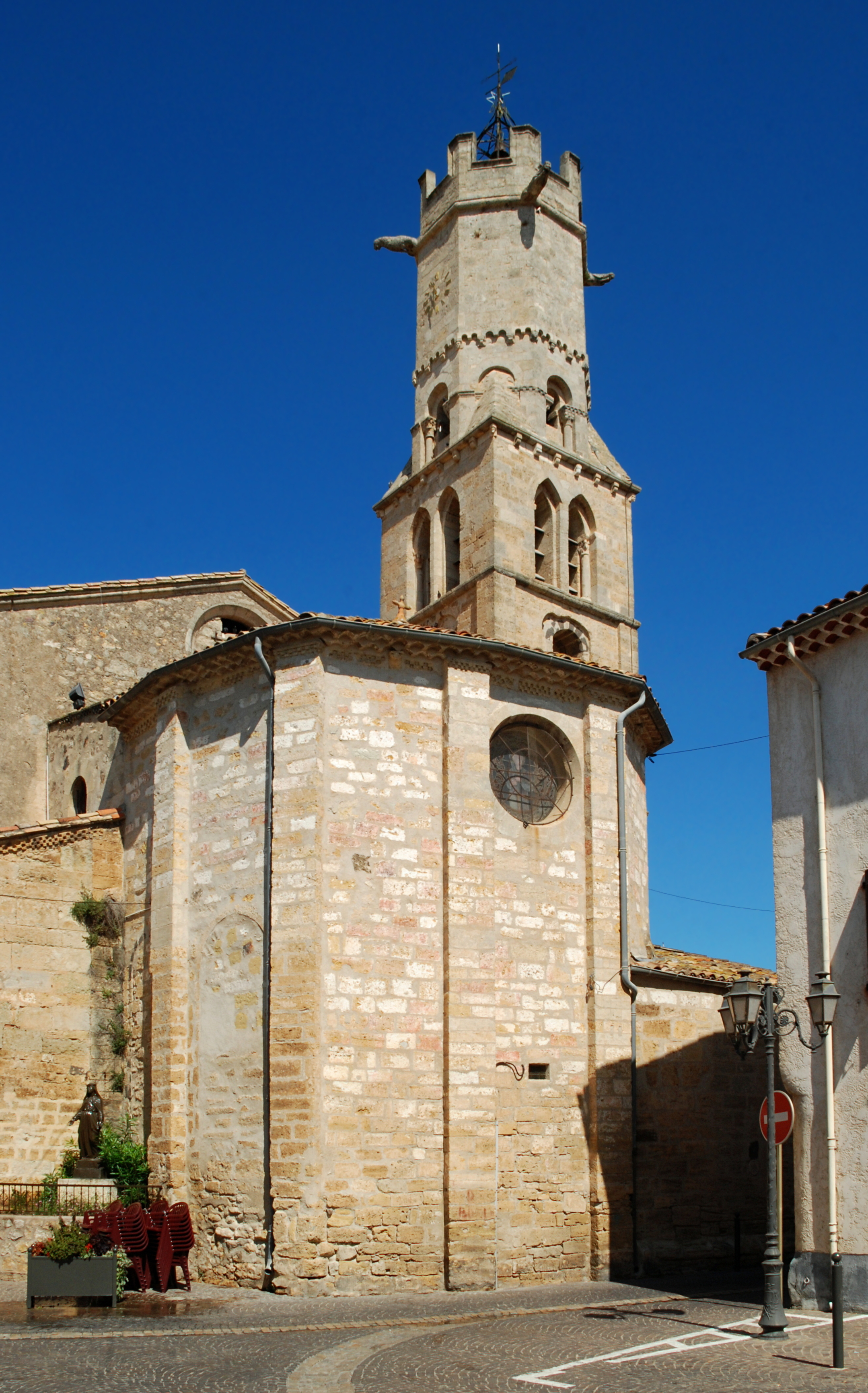 France - Languedoc - Hérault - Villeneuve-lès-Béziers - église de l'Invention-de-Saint-Étienne